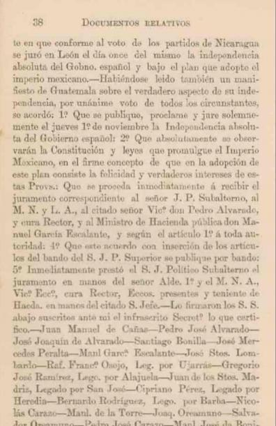 Página del libro «Documentos relativos a la Independencia» compilados por Francisco María Iglesias y publicados por primera vez en 1899, en la que se reproduce parte del Acta de Cartago del 29 de octubre de 1821 donde se proclama la independencia de Costa Rica de España.